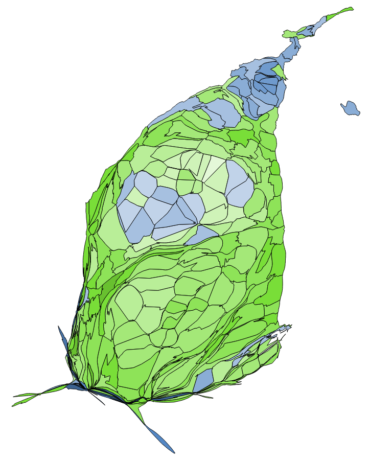 顏色對照表